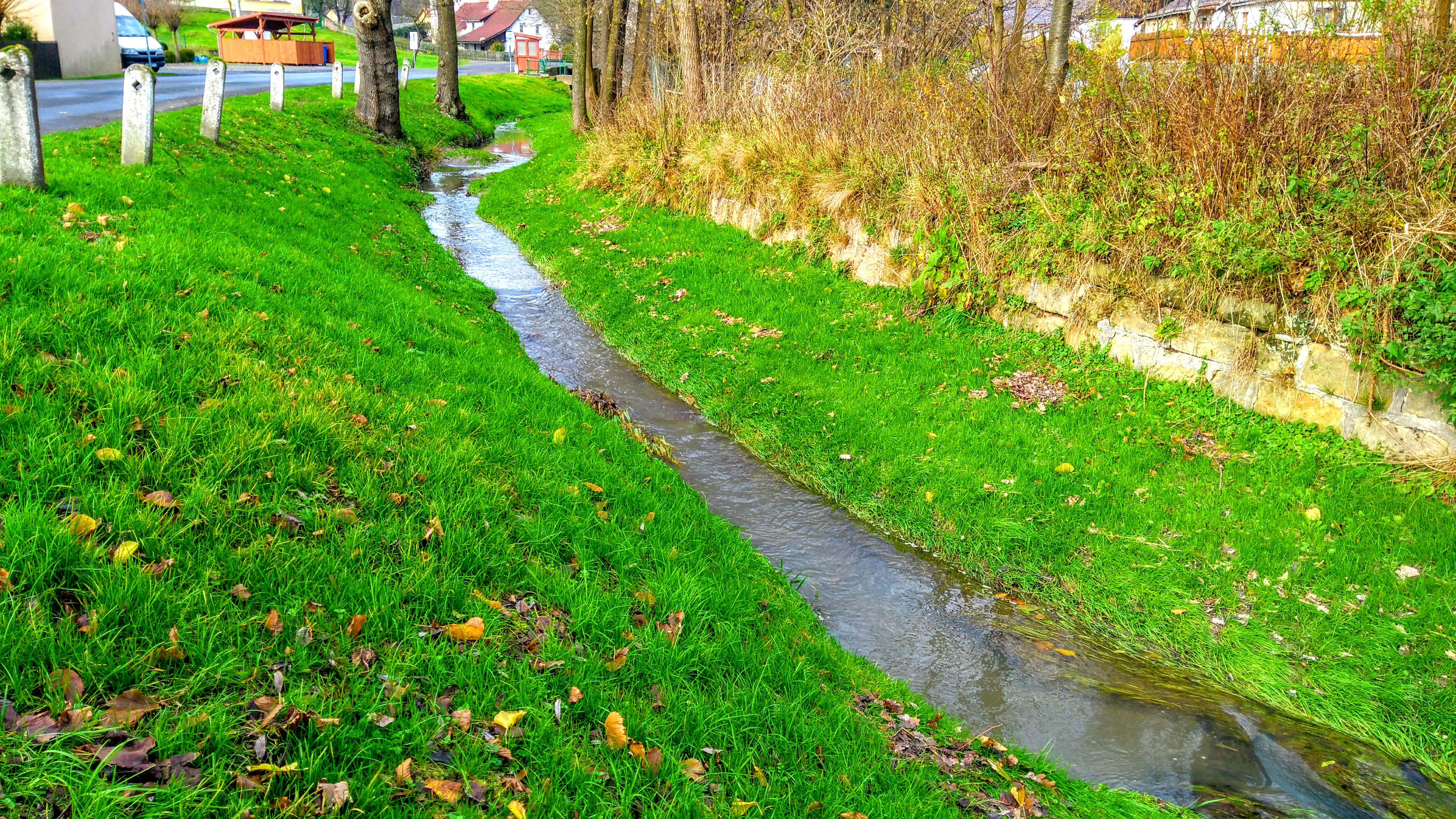 Potok.